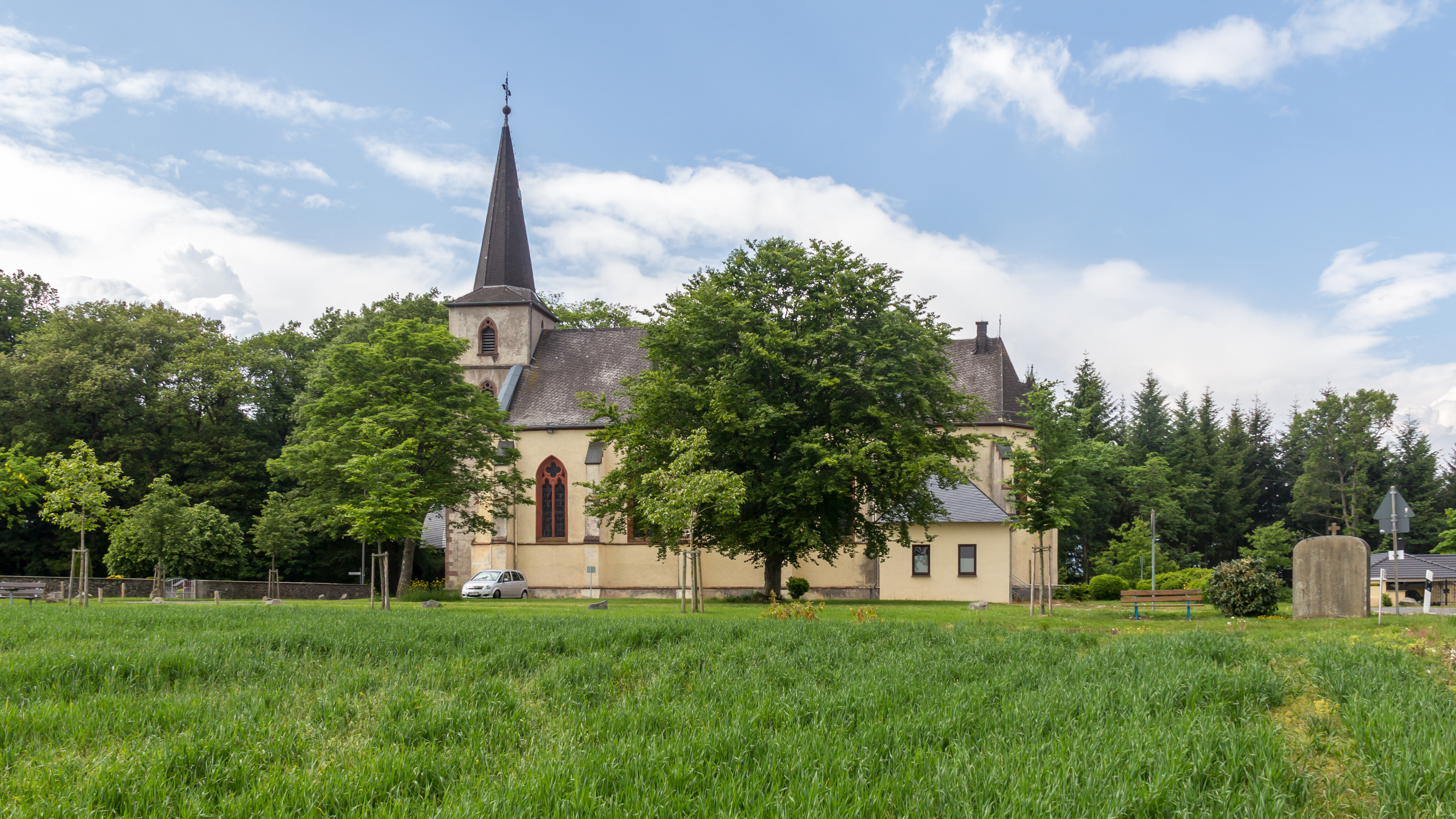 Katholische Pfarrkirche St. Visitationis, Pantenburg-Buchholz This is a photograph of an architectural monument.It is on the list of cultural monuments of Pantenburg